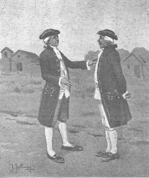 Reproducción en blanco y negro de pintura de Mariano Fortuny (1838-1874), dibujante español nacido en Tarragona.